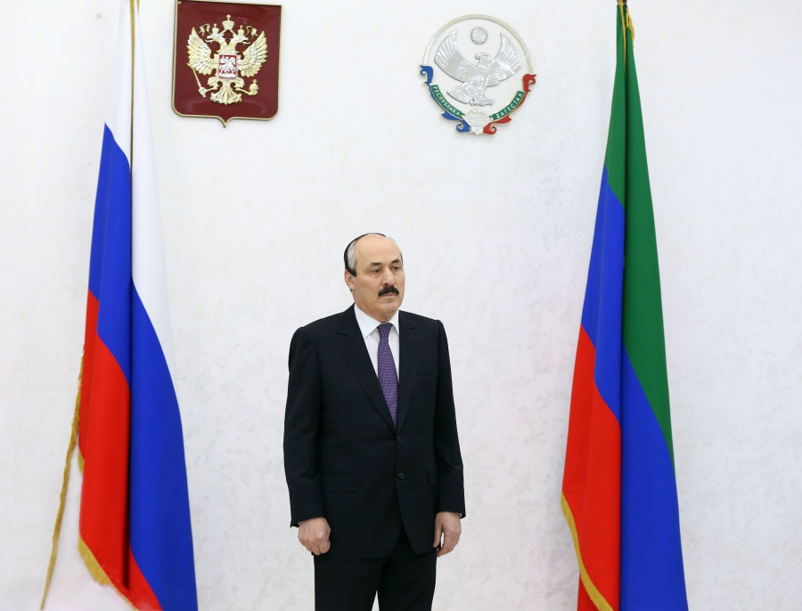 Глава Республики Дагестан Рамазан Абдулатипов